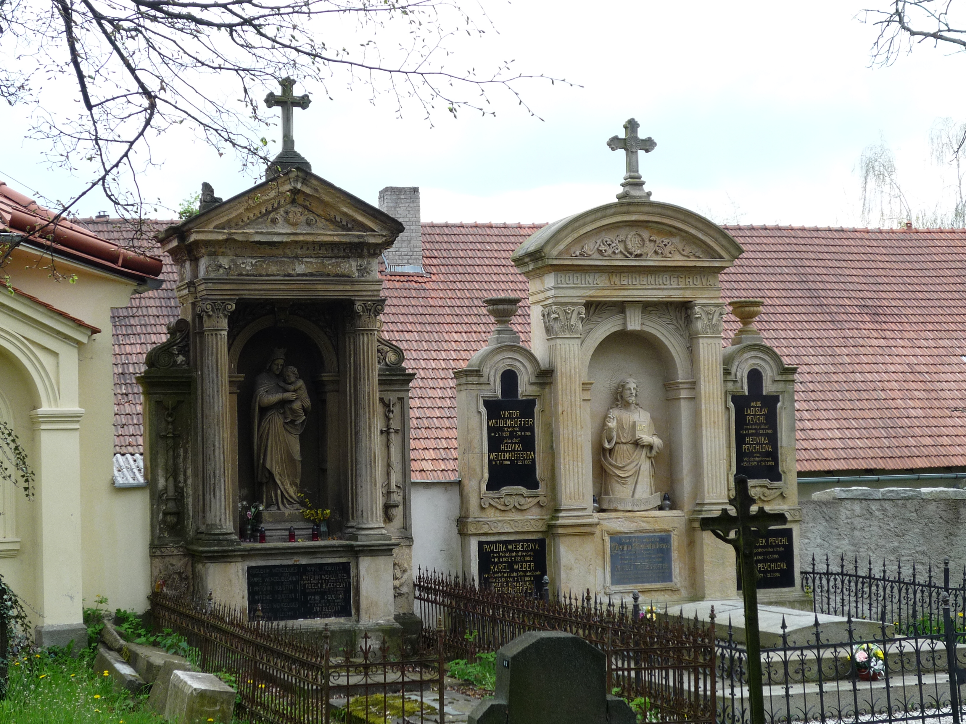 Autor fotografie Jiří Zelenka. Toulky Vysočinou. Kostel sv. Vojtěcha a jeho přilehlé okolí. Havlíčkův Brod. Kraj Vysočina.